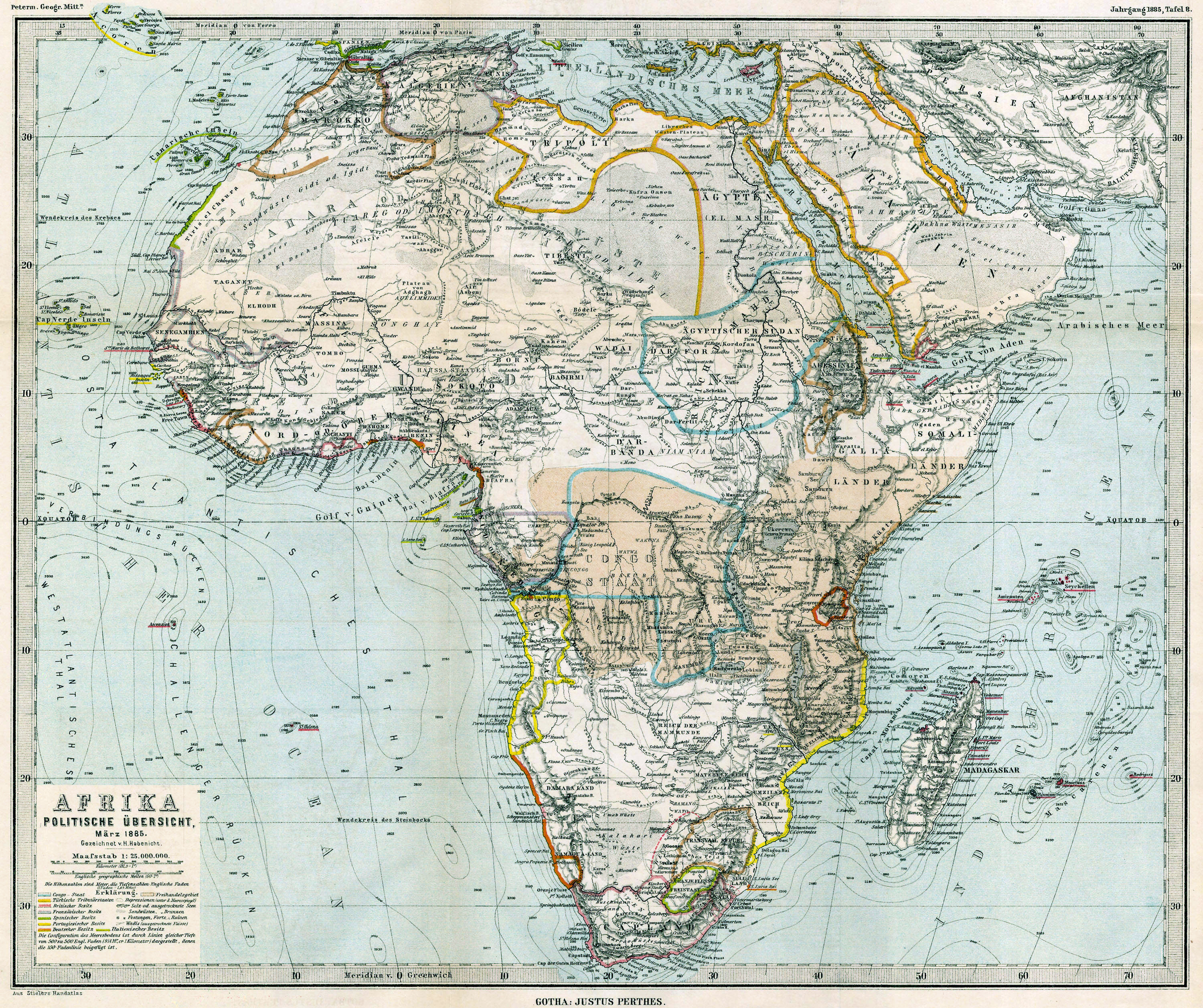 Politische Übersichtskarte des afrikanischen Kontinents vom März 1885. Die europäischen "Besitzungen" sind farbig markiert. Maßstab: 1:25.000.000